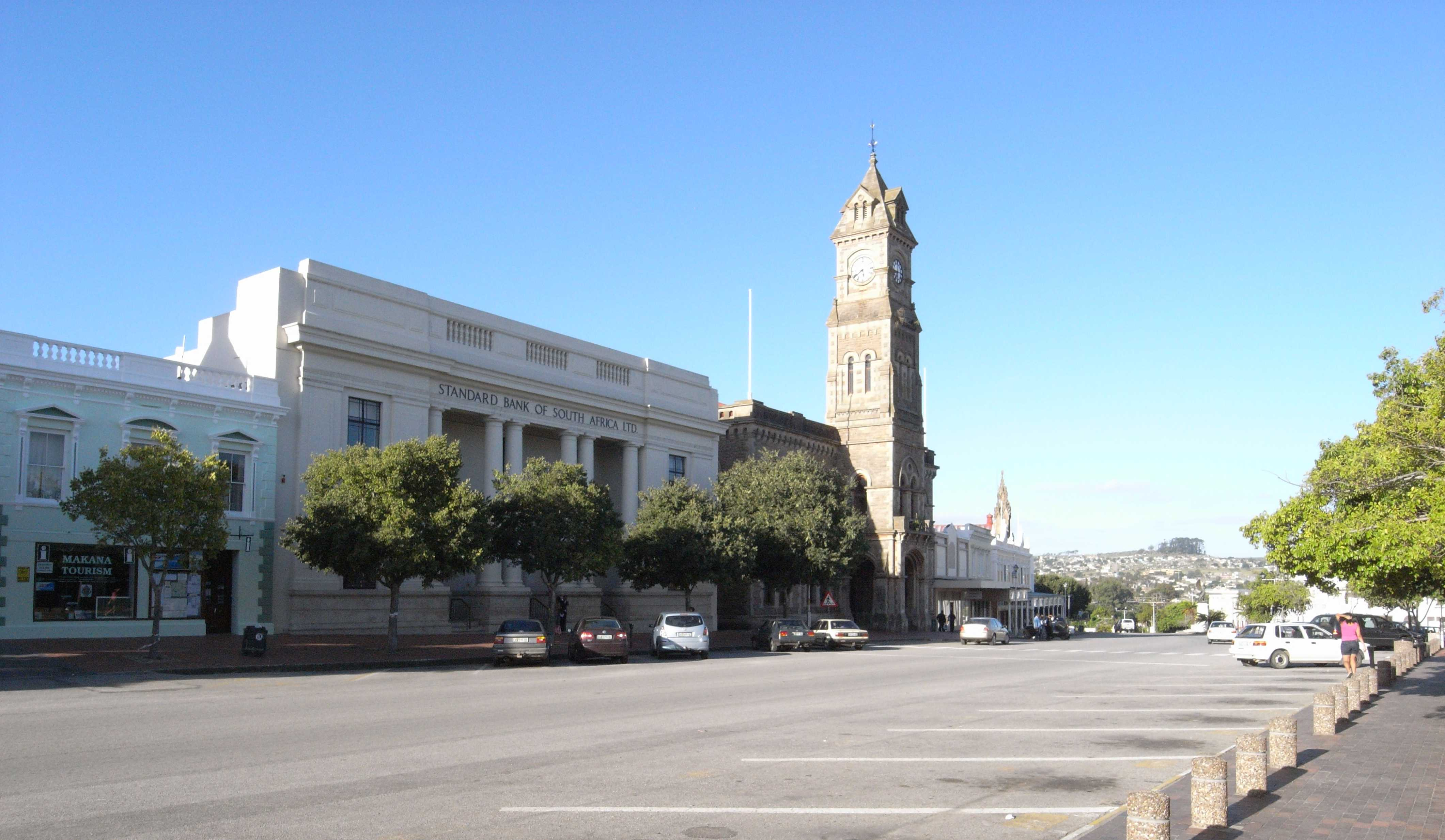 Grahamstown, Bank and City Hall on the Church Square (Eastern Cape, RSA)